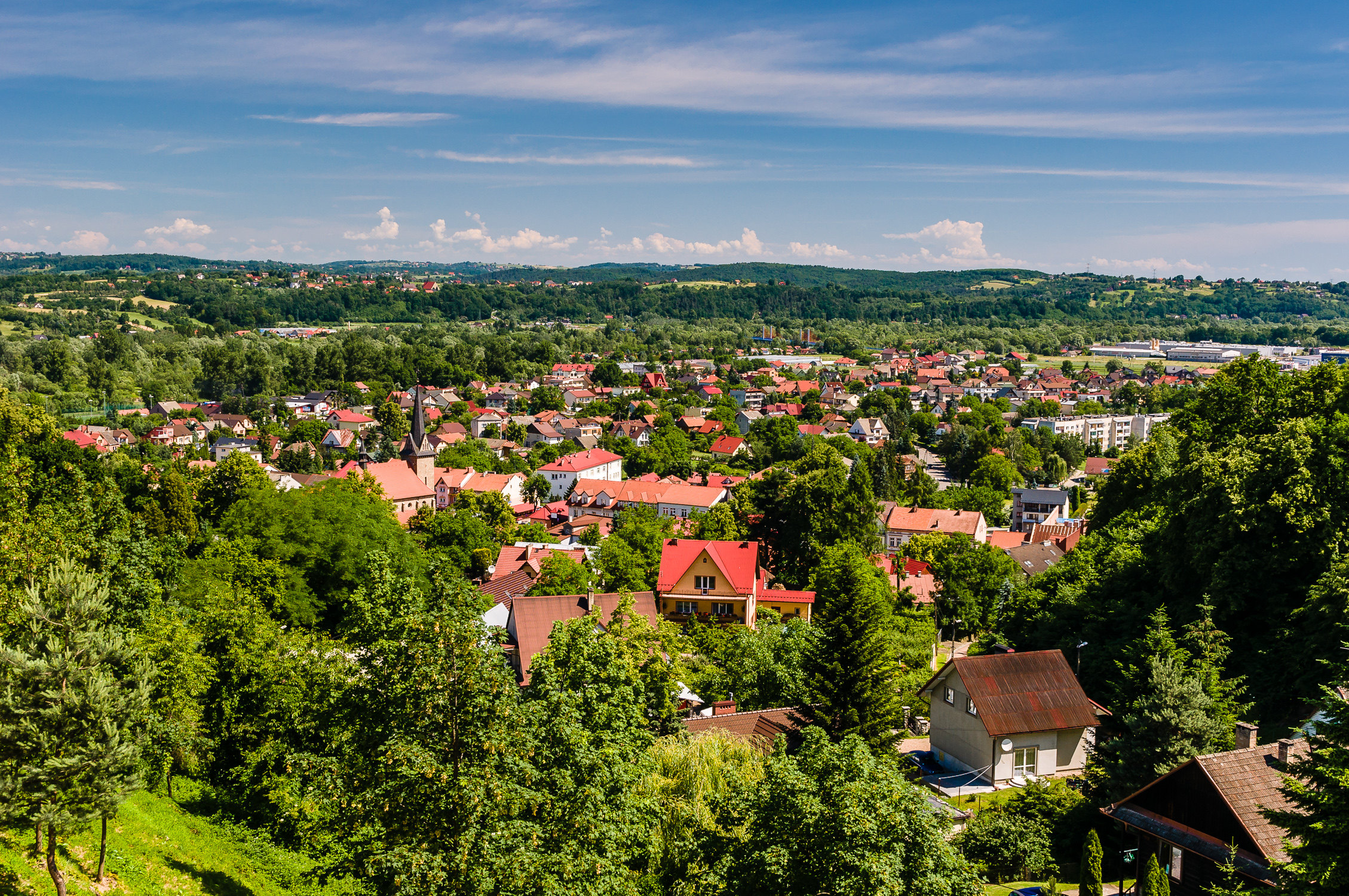 Widok na Dobczyce z baszty murów obronnych